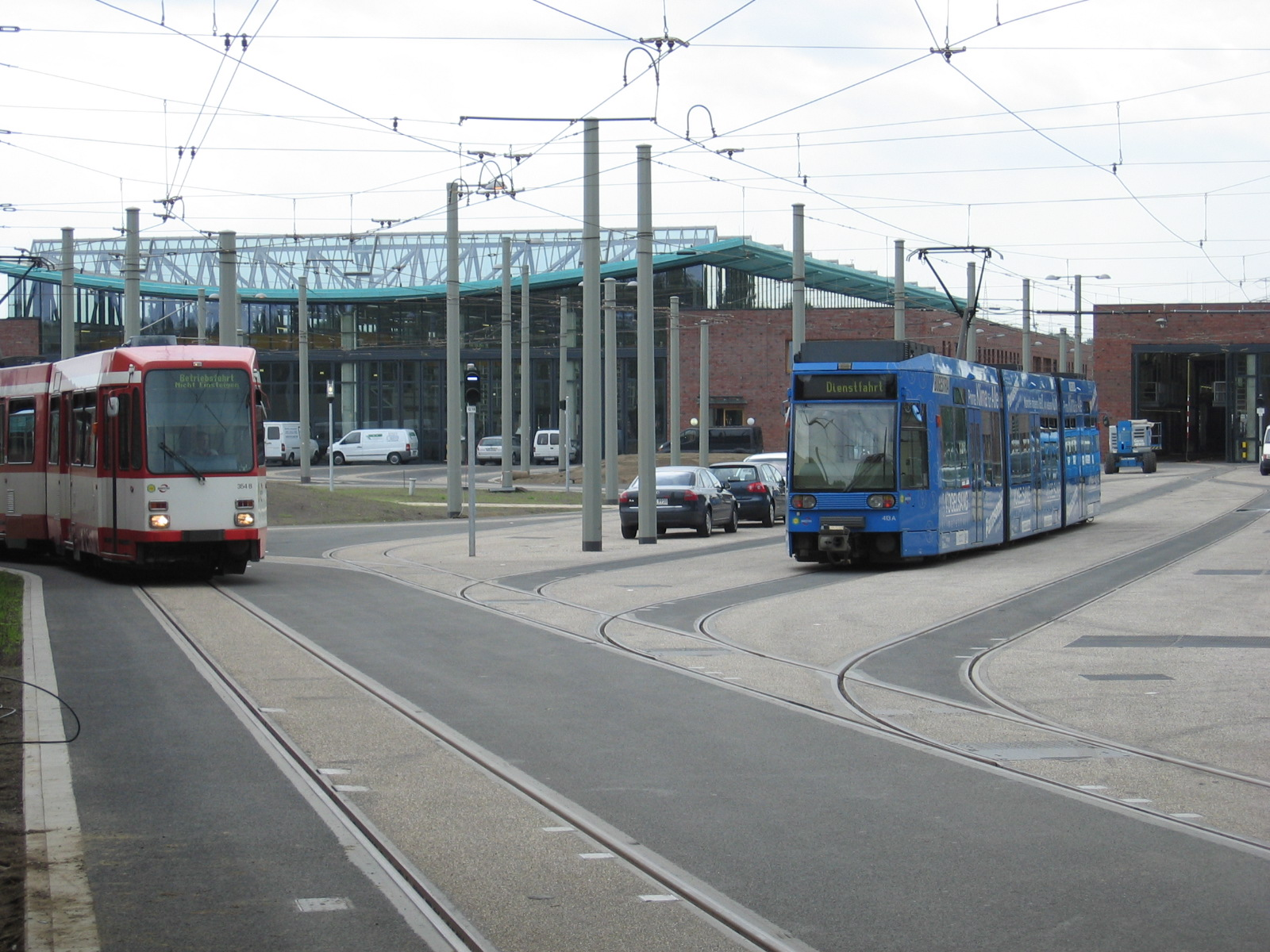 BOGESTRA Betriebshof Engelsburgerstraße